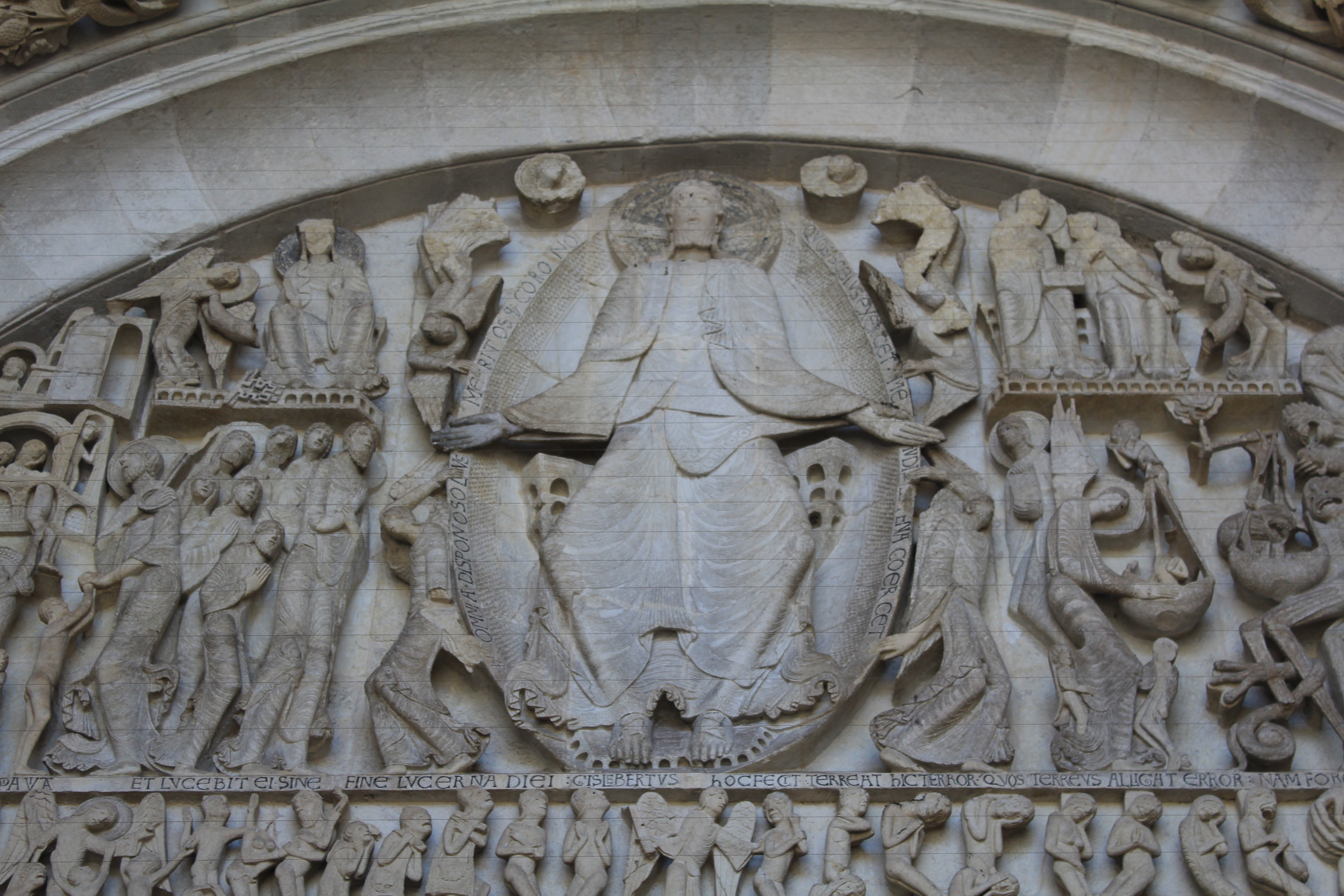 Portail de la cathédrale Saint-Lazare d'Autun.